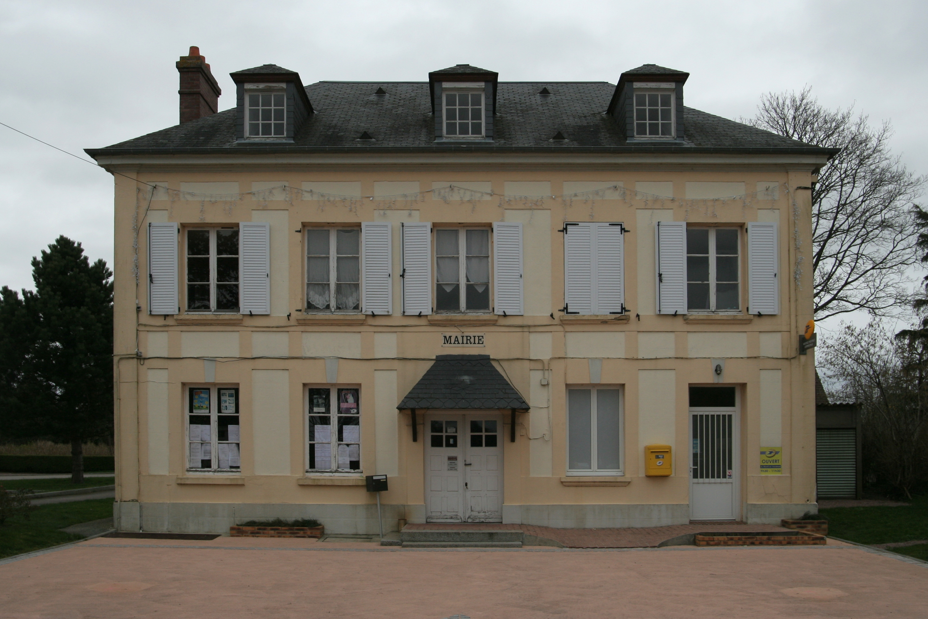 Mairie d'Annebault.